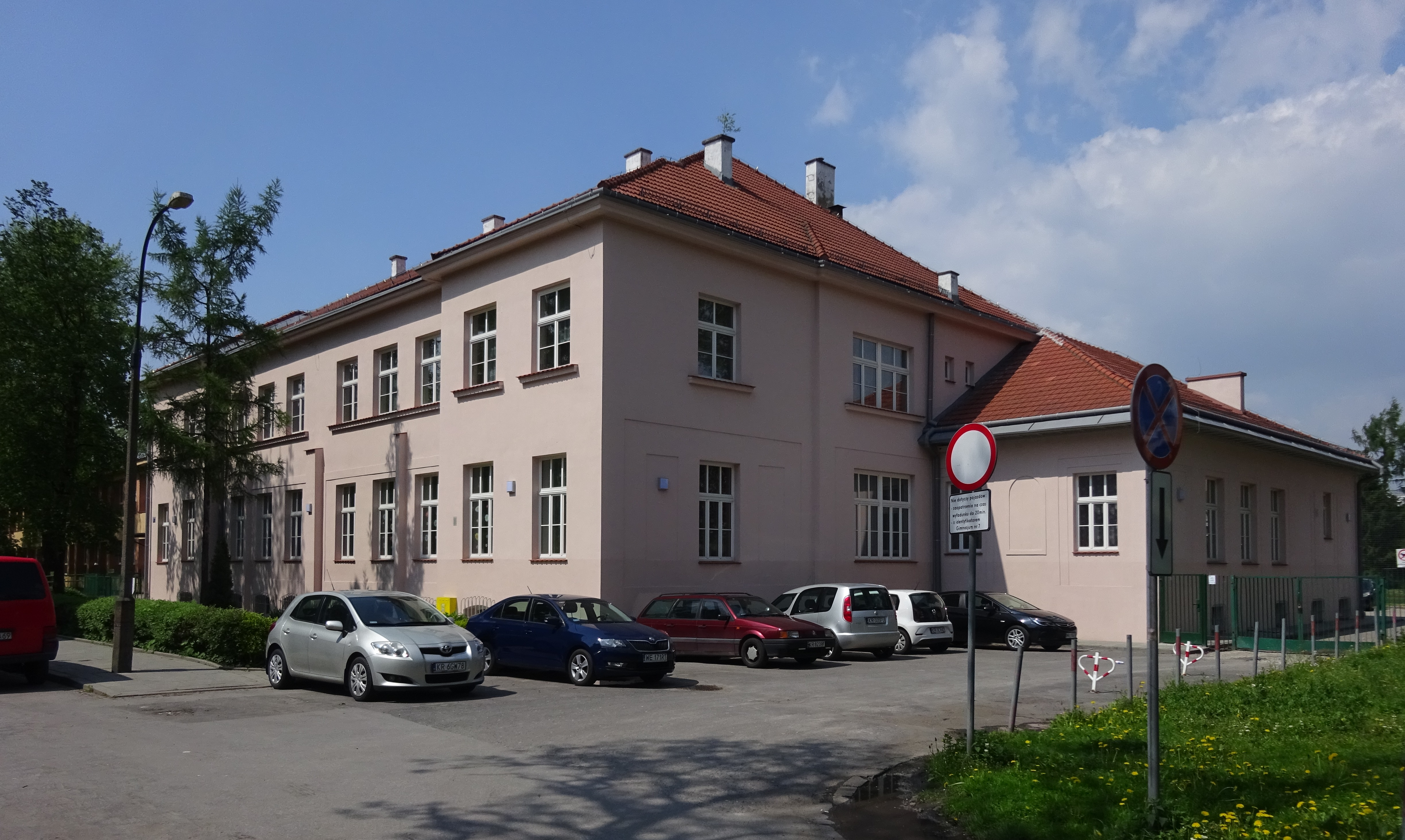 Dawna szkoła ludowa na Dąbiu, zbudowana w latach 1913-1915 wg projektu Jana Zawiejskiego. Obecnie Szkoła Podstawowa nr 39. Kraków, ulica Jachowicza.